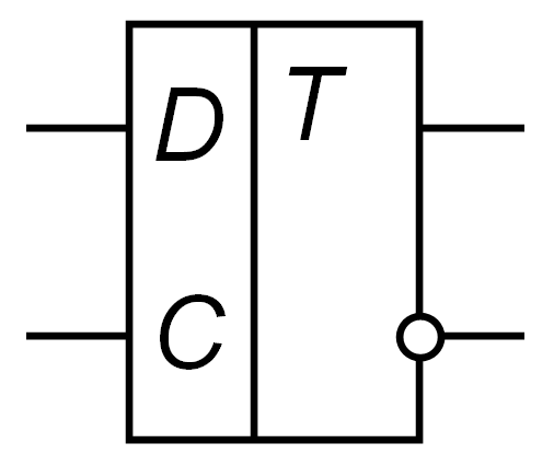 Условное графическое изображение D-триггера